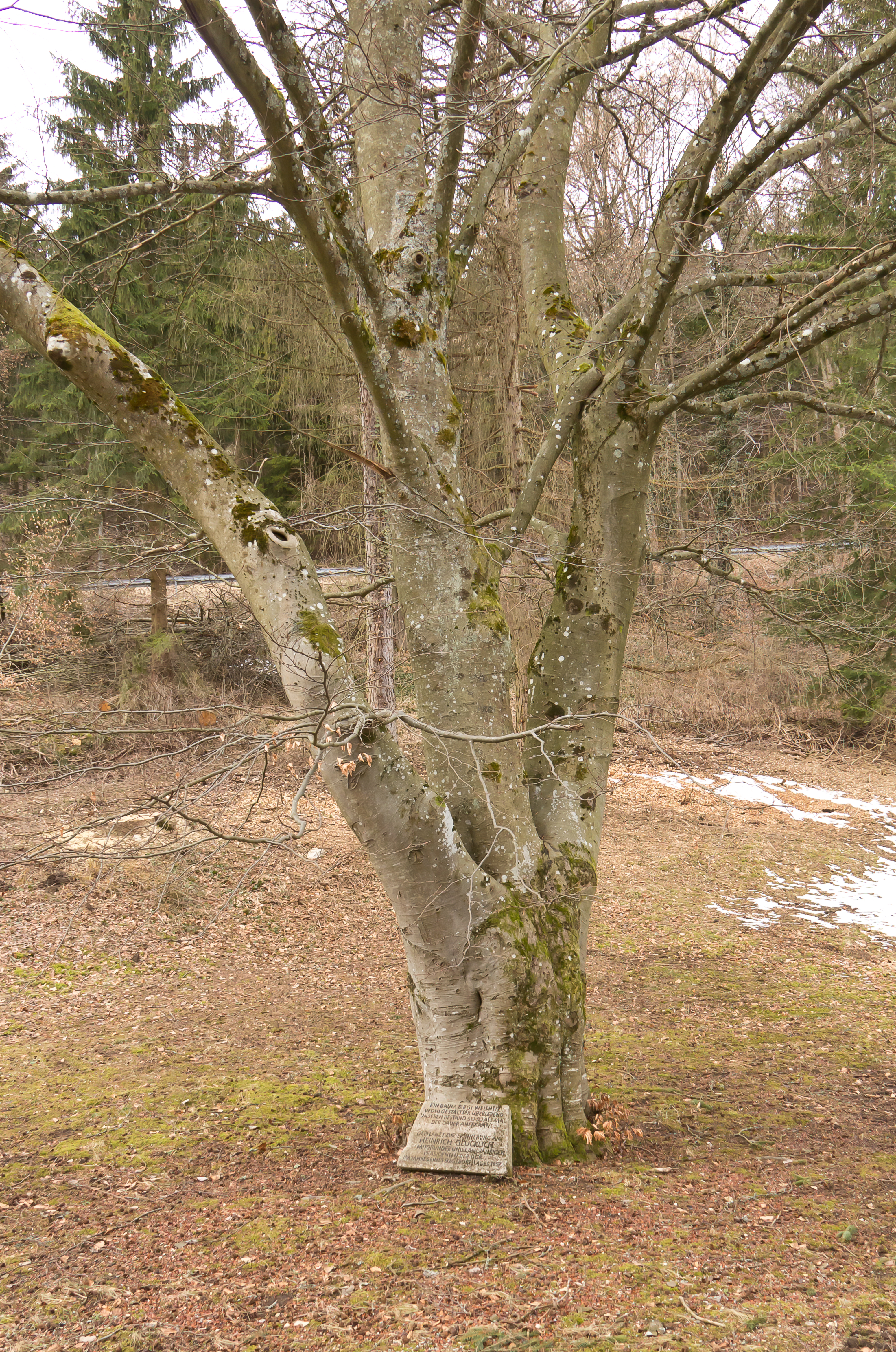 Baum vor dem Haus auf der Alb, Bad Urach. 1957 gepflanzt zur Erinnerung an Heinrich Glücklich. Zu seinem Fuß befindet sich eine Tafel mit dem Text: Ein Baum birgt Weisheit wohlgestalt der überlebend unseren Bestand sei so alsmal der Dauer anerkannt. Gepflanzt zur Erinnerung an Heinrich Glücklich Mitgründer und langjährigen Präsidenten der DGK im Jahre seines 80. Geburtstages 1957